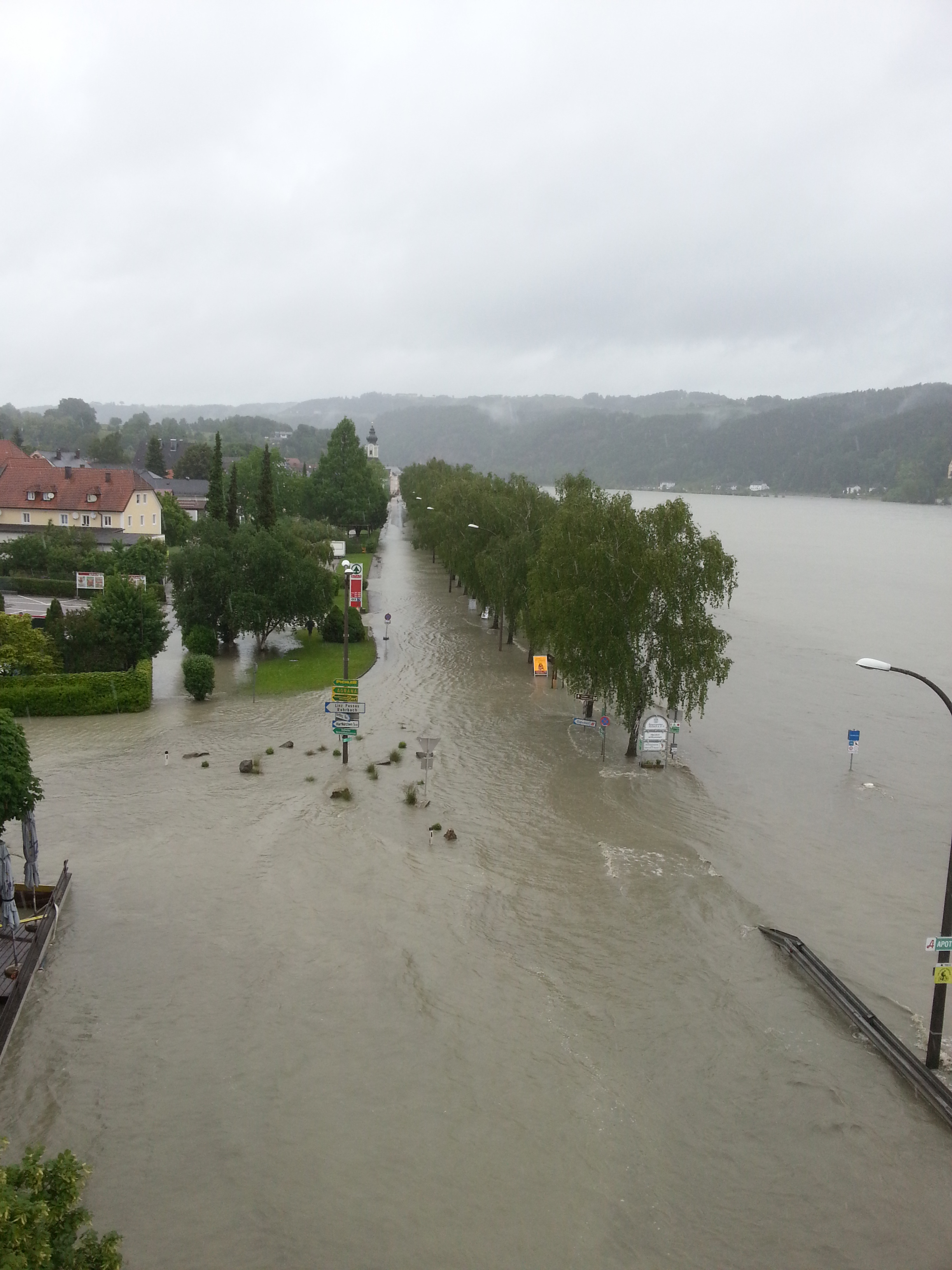 Hochwasser in Aschach an der Donau, 2.6.2013, 13:30 Uhr